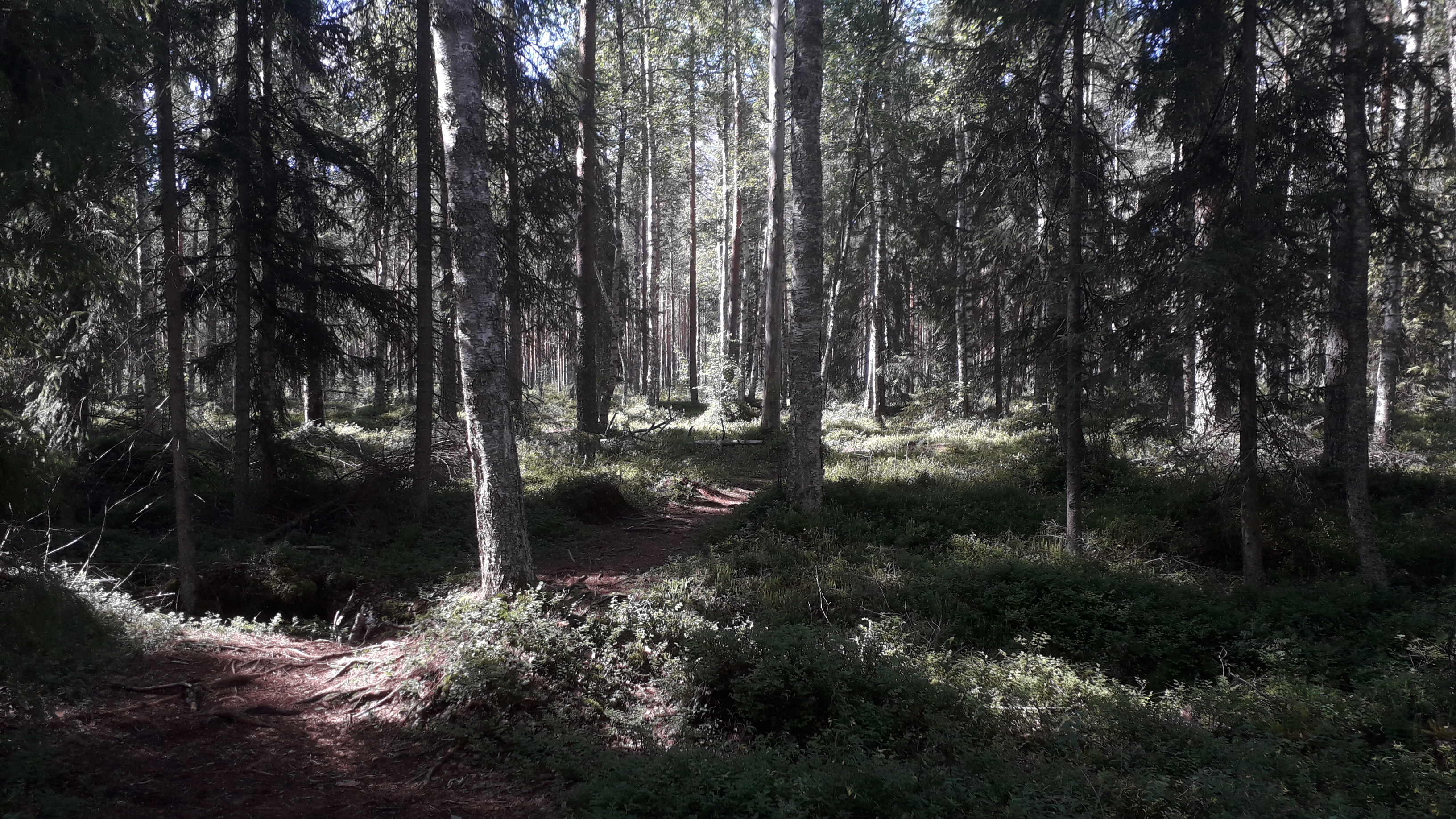 Riihimäellä sijaitseva Uhkolansuo heinäkuussa 2020.